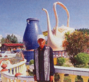 Ayah Pin